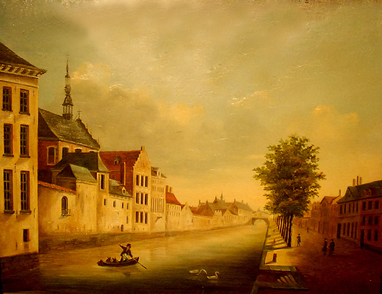 Schilderij van Joseph Van Haerde (19e-eeuws Belgisch schilder) van het voormalige Alexianenklooster te Gent (België) aan de inmiddels gedempte Oude Houtlei